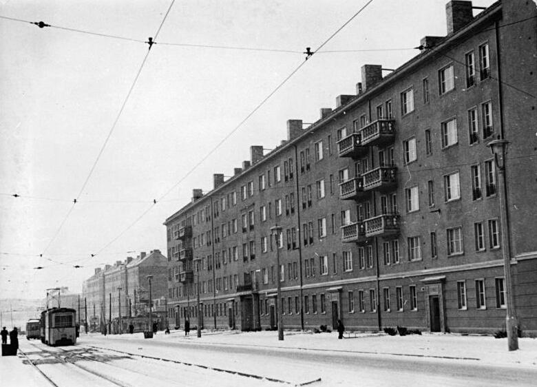 Berlin, Prenzlauer Berg, Kniprode-Straße, Wohnblocks, Winter Zentralbild Zühlsdorf 7.2.1956 Erfolge des ersten Fünfjahrplans Neue Wohnungen im Stadtbezirk Prenzlauer Berg in Berlin In der Braunsberger-Strasse und in der Kniprode-Strasse im Stadtbezirk Prenzlauer Berg, wo noch vor wenigen Jahren riesige Trümmerberge von der faschistischen Zerstörung unserer Hauptstadt Zeugnis ablegten, stehen heute nach Beendigung des ersten Fünfjahrplans neue, schöne Wohnhäuser. Unter Führung der Partei der Arbeiterklasse- der Sozialistischen Einheitspartei Deutschlands- gingen die Berliner im Jahre 1952 daran, ihre Hauptstadt von des Spuren des Krieges zu befreien und schafften Platz für neue Wohnbauten. Es war eine schwere und harte Arbeit, die sich aber verlohnte und deren Erfolge heute für alle Welt sichtbar sind. UBz: Im ersten Fünfjahrplan entstand dieser neue Wohnblock in der Kniprode-Strasse mit 113 komfortablen Wohnungen. 1945 wurde dieser Teil der Strasse von SS-Banditen mit Flammenwerfern restlos zerstört.